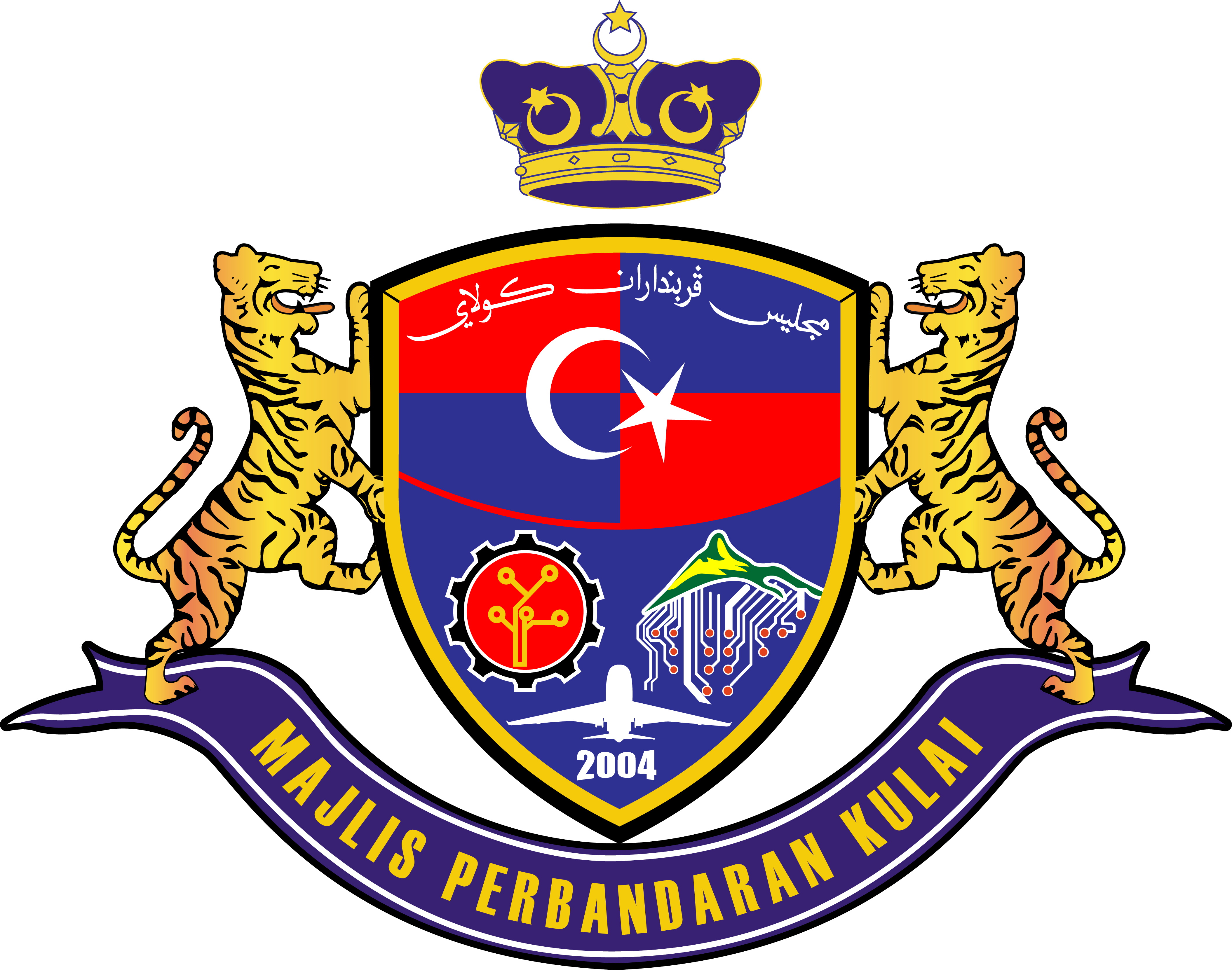 古来市议会2018新徽章